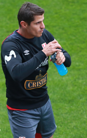 Aldo Corzo entrenando con la selección de fútbol del Perú en la Copa Mundial de 2018.